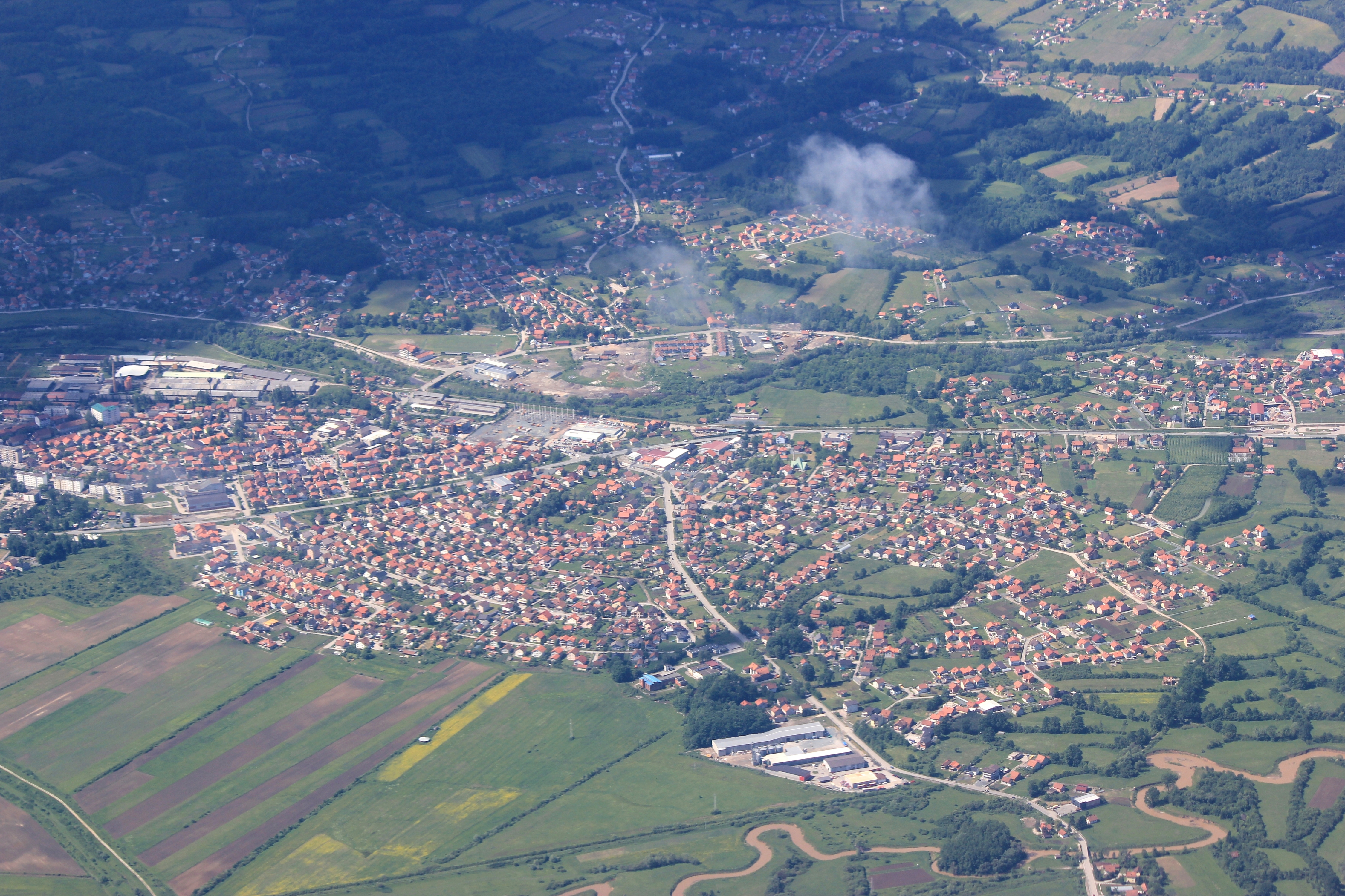 Luftbild von Živinice